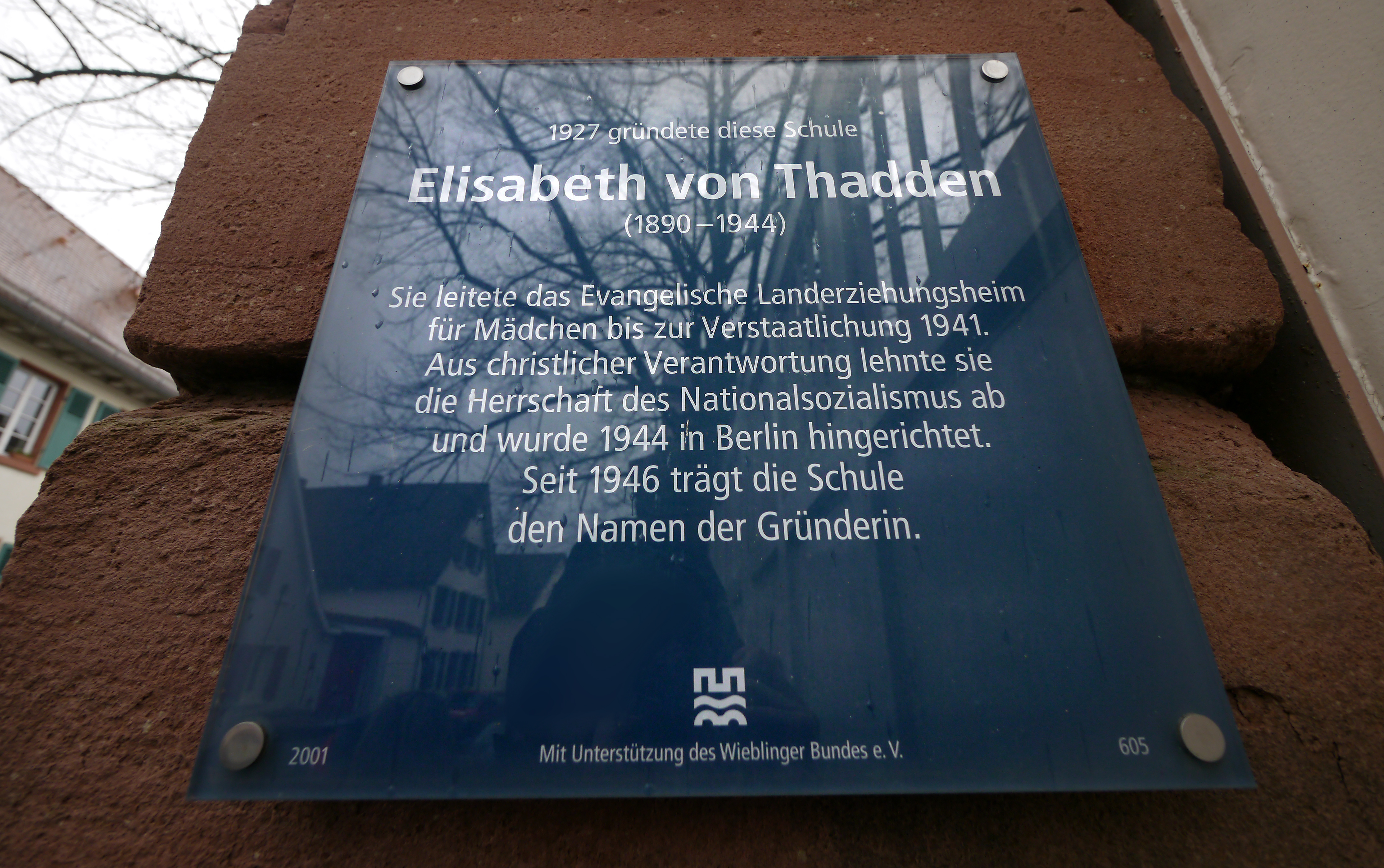 Gedenktafel für Elisabeth von Thadden (Widerstandskämpferin) zur Zeit der nationalsozialistischen Diktatur, an dem Eingang zu der nach ihr 1946 benannten Schule in Wieblingen